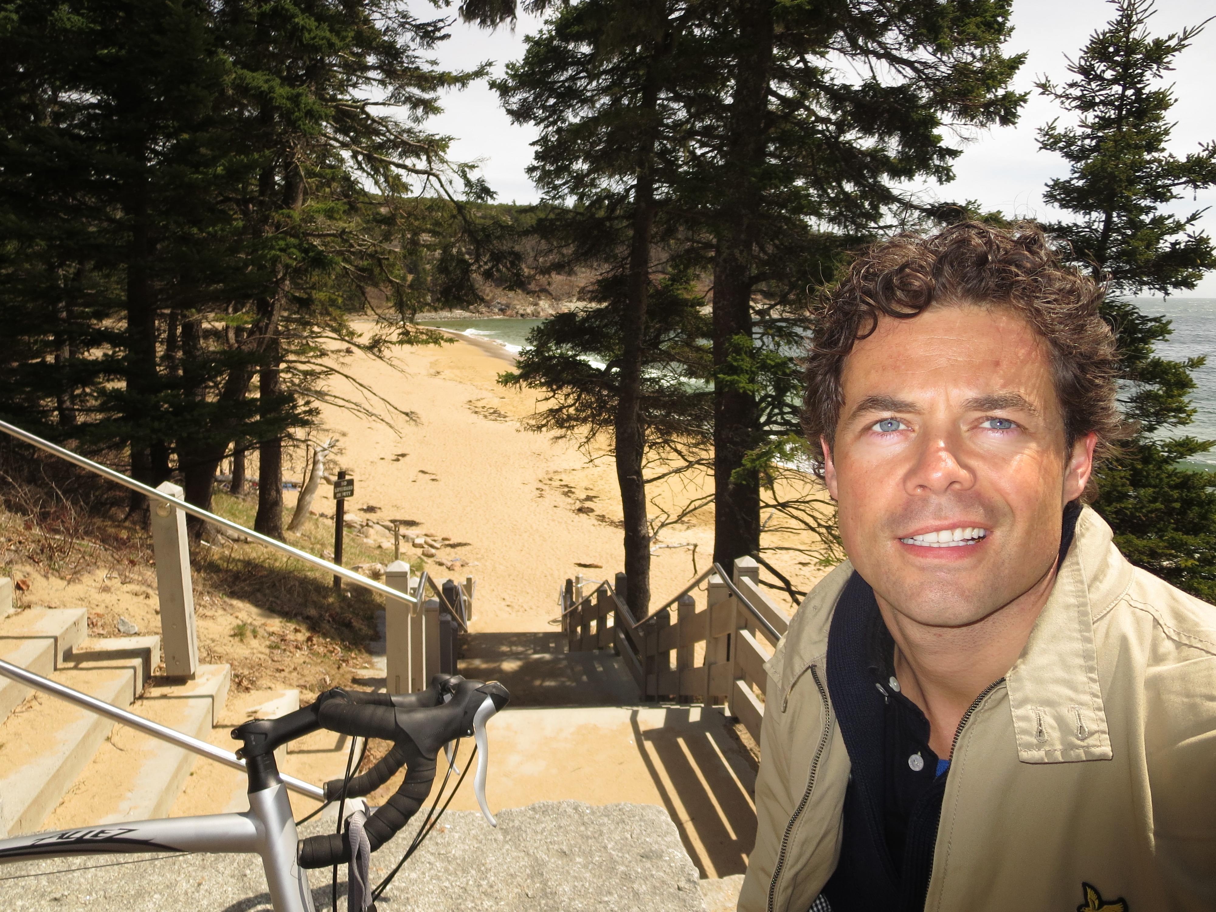 Jeroen van Wijngaarden